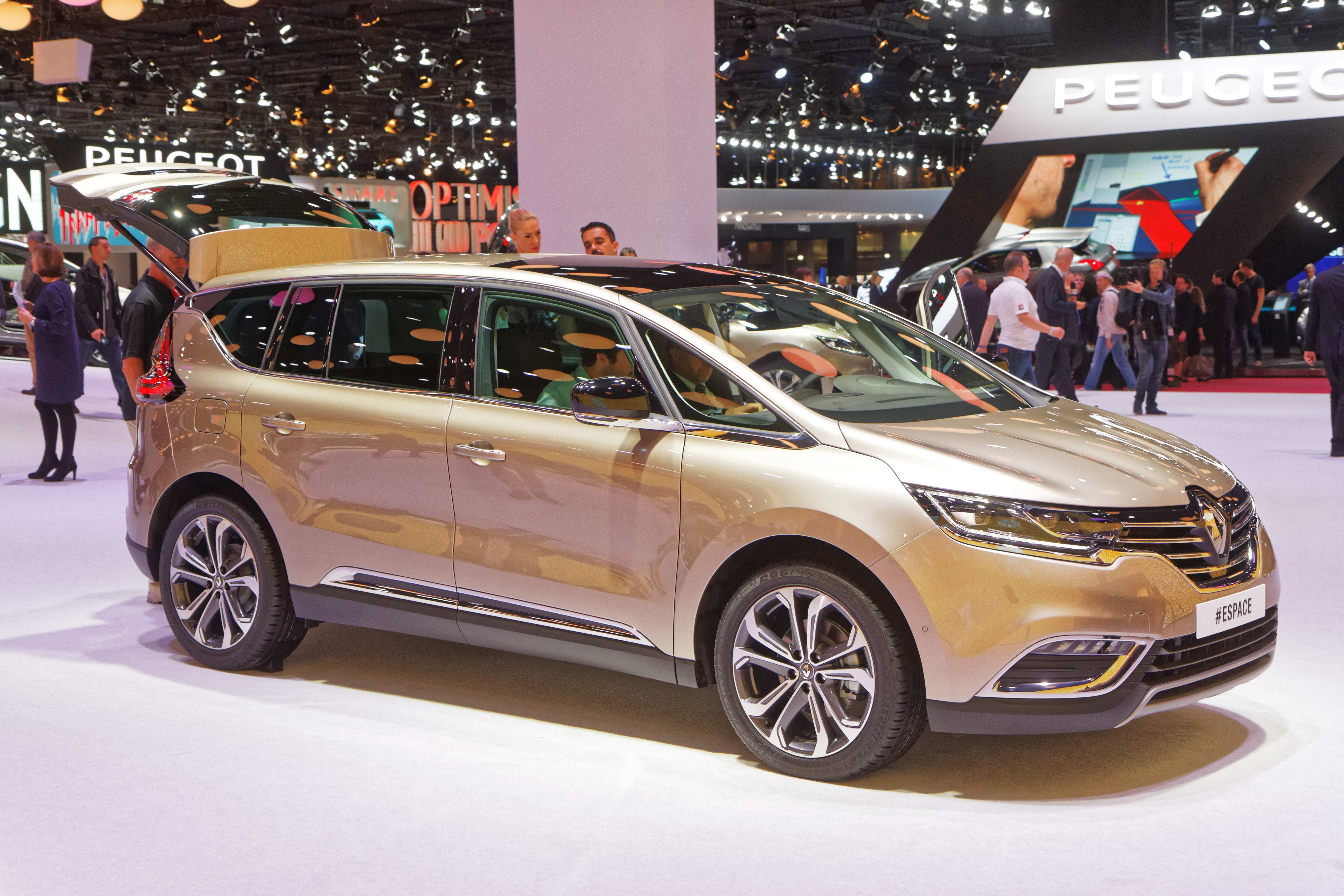 Une Renault Espace présentée lors du mondial de l'automobile de Paris 2014.